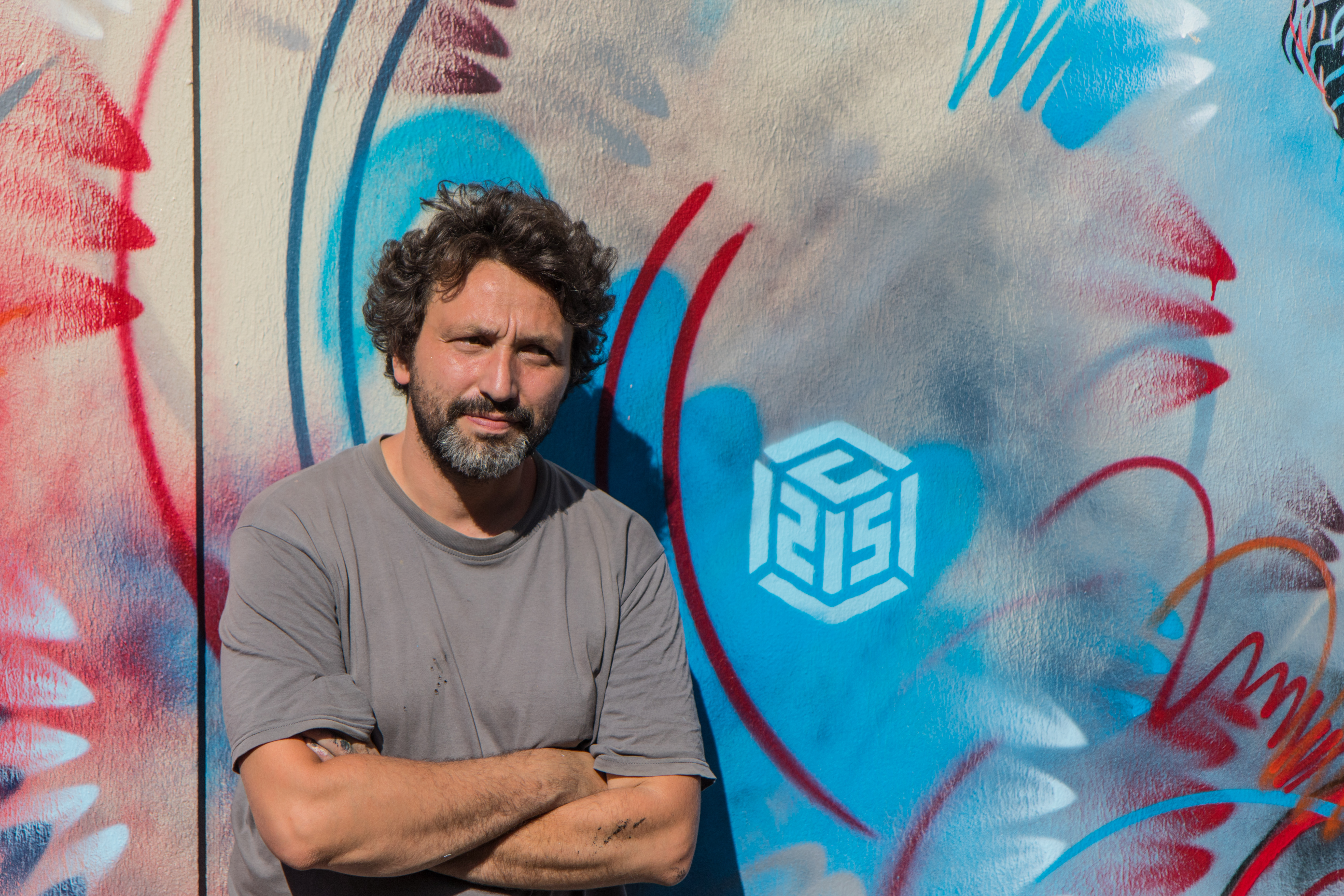 Christian Guémy lors de la présention de sa fresque au Musée de la Résistance et de la déportation de Grenoble.